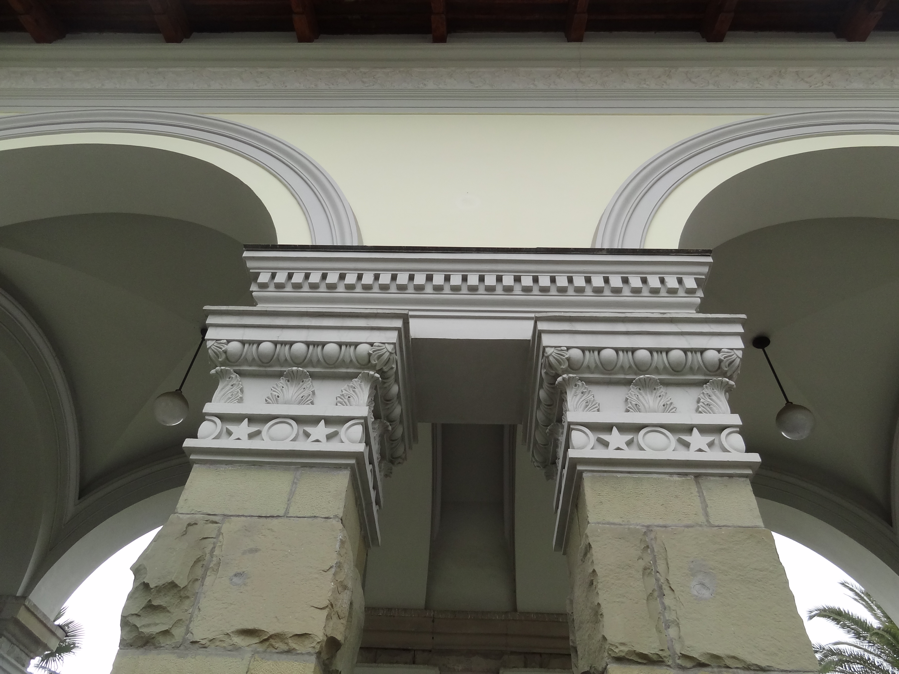 Здание железнодорожного вокзала (Краснодарский край, Сочи, центральный р-н, ж/д ст. сочи)